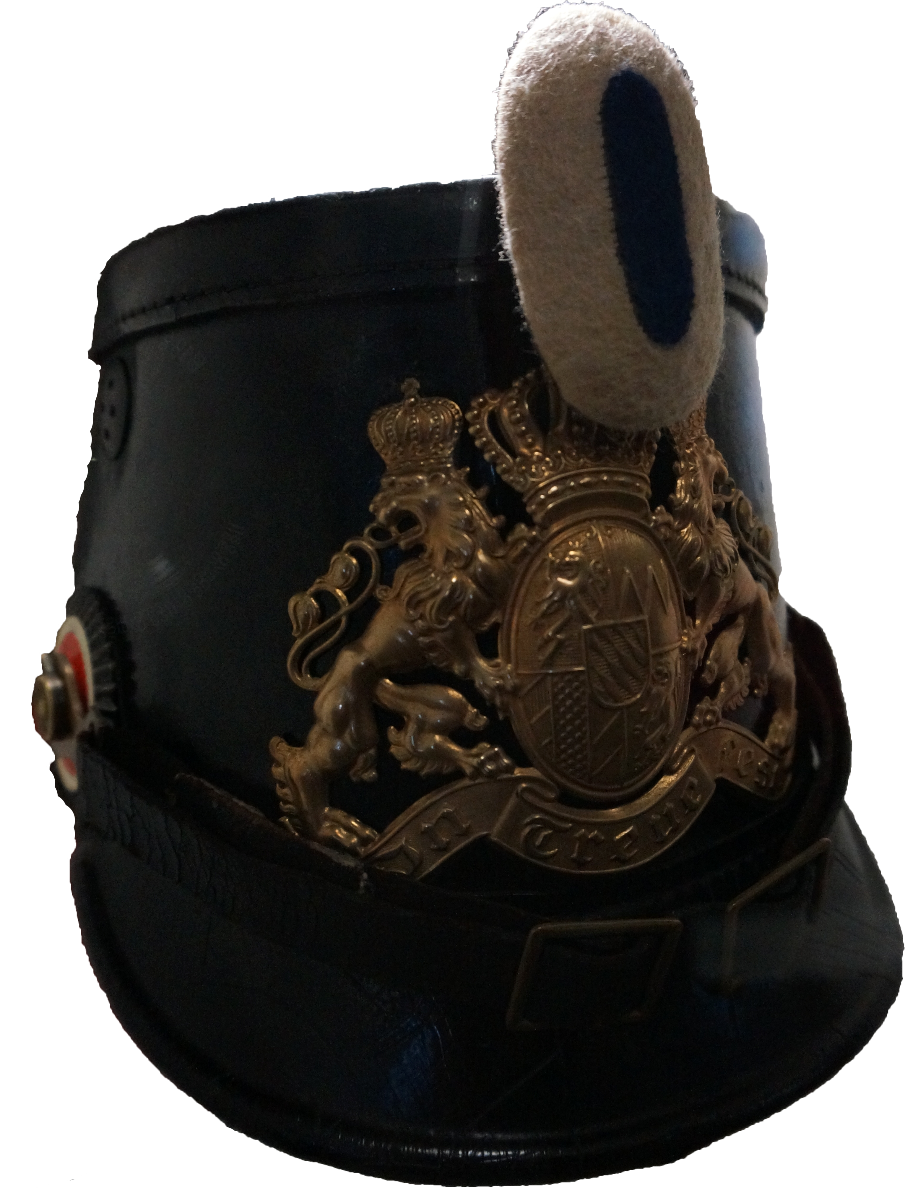 Lors de l'exposition temporaire été 1914 Nancy et la Lorraine dans la guerre au Musée Lorrain.